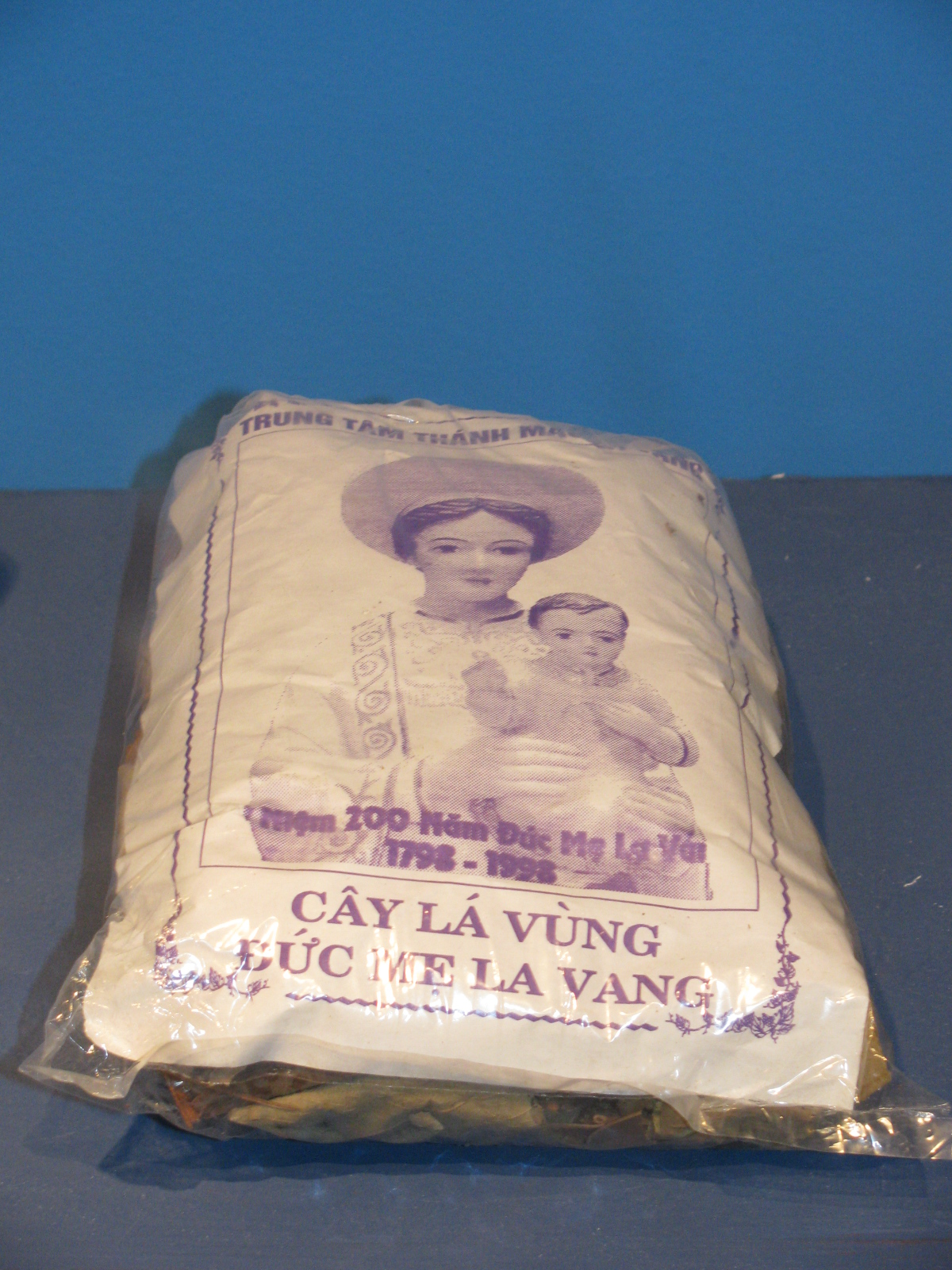 Lá cây Đức Mẹ La Vang